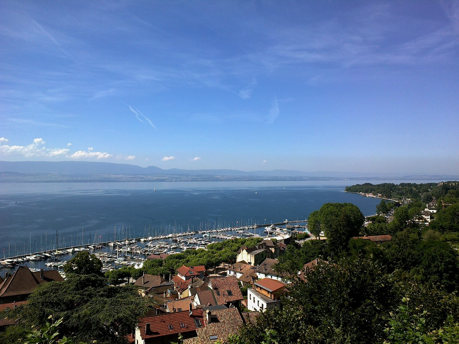 Haute-Savoie Thonon-Les-Bains Place Chateau Lac Leman 03072014